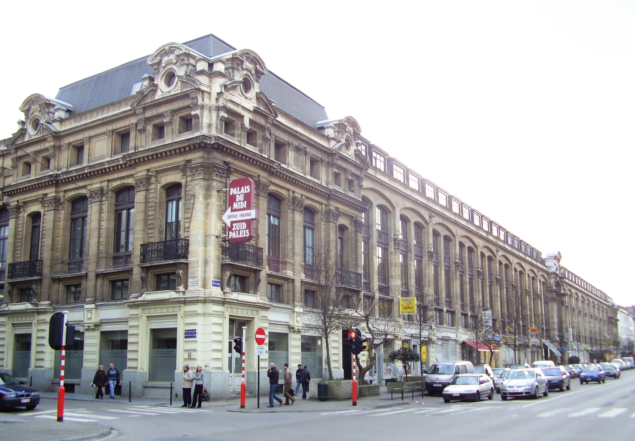 Palais du Midi, boulevard Lemonnier, architecte Wynand Janssens- Bruxelles 1880